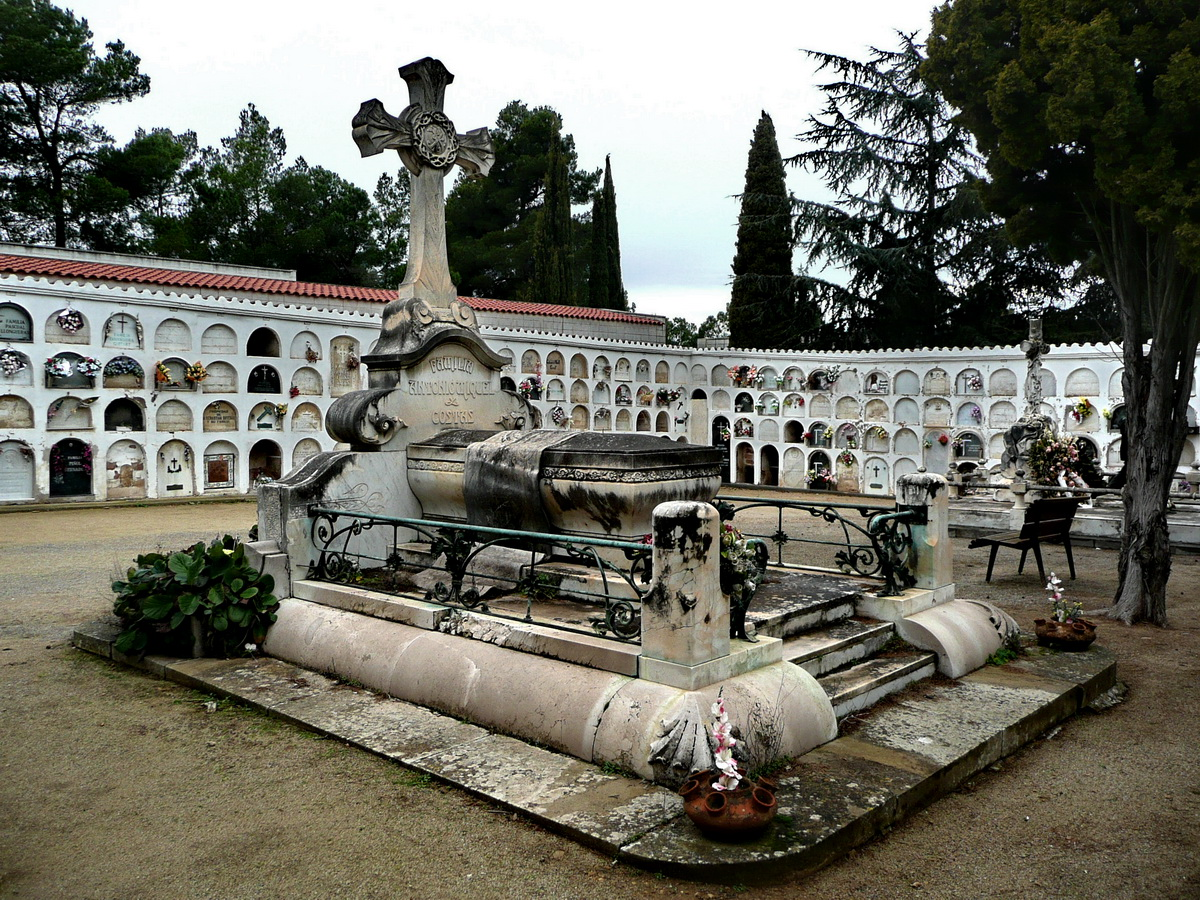 Panteó d'Antonio Miquel y Costas a Capellades (Catalunya), obra de Joaquim Raspall (circa 1927).